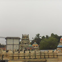 శ్రీ సాక్షి భావన్నారాయణ స్వామి వారి ఆలయ ప్రాకారం